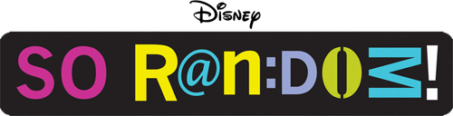 Logo der Disney-Serie So Random!